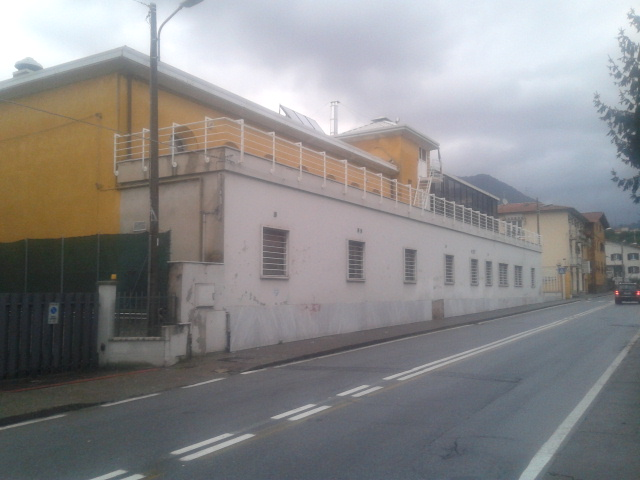 Casa del Balilla (Massa), vista da via Marina Vecchia